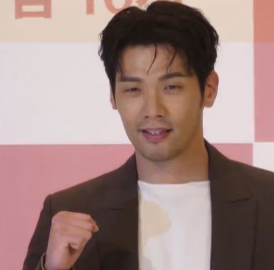 29일 오후 서울시 영등포구 타임스퀘어에서 KBS 2TV 새 수목드라마 '오늘의 탐정'(극본 한지완/연출 이재훈/제작 비욘드제이) 제작 발표회가 열려 최다니엘, 박은빈, 이지아, 김원해가 참석해 포토타임을 갖고 있다.